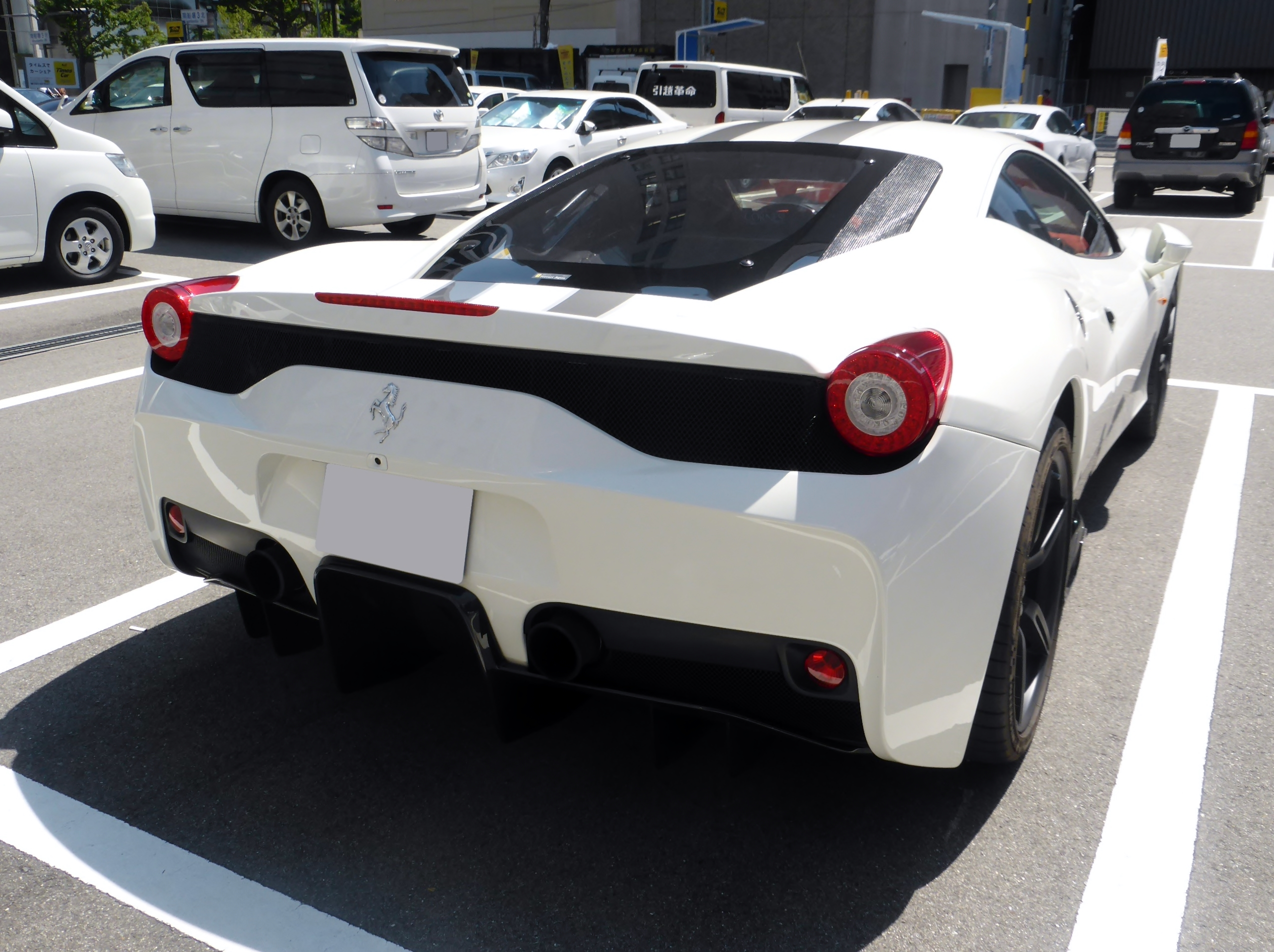 コーンズ大阪の試乗車として用いられているフェラーリ・458スペチアーレをリアから撮影。